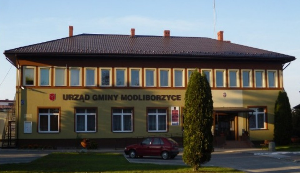 Budynek Urzędu Gminy Modliborzyce.